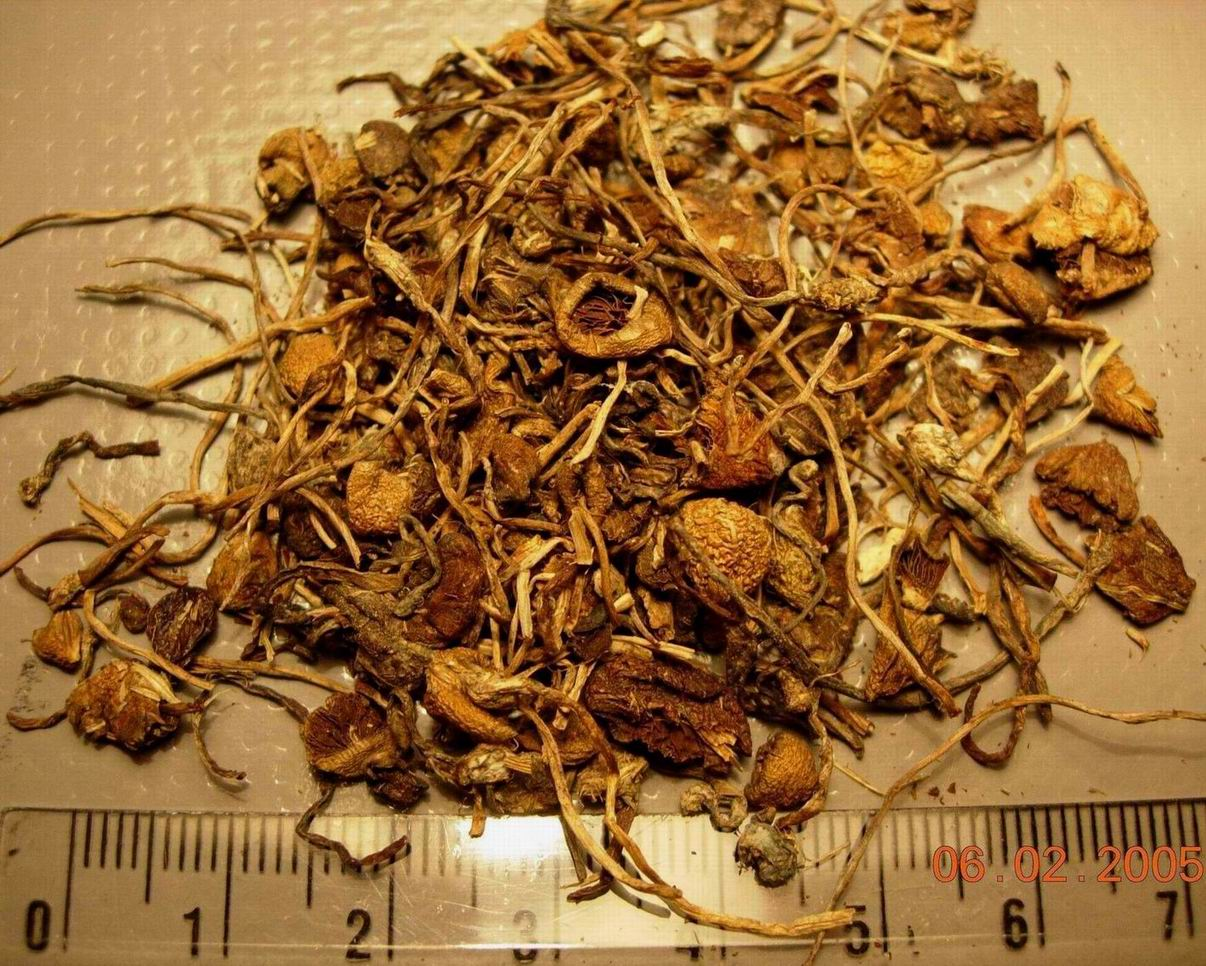 Spitzkegeliger Kahlkopf